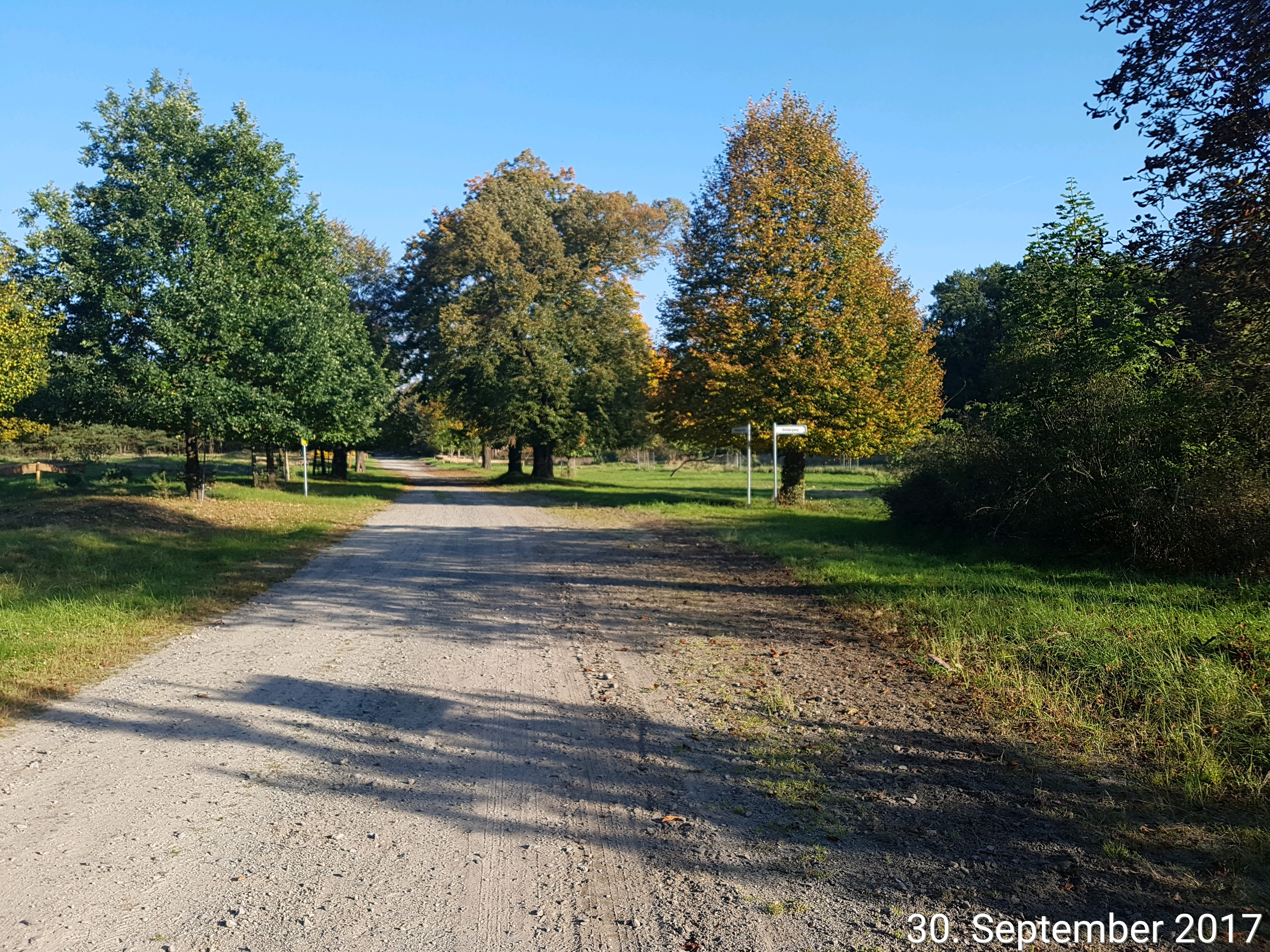 Ortstraße Tränke 2017, Blick nach Südost